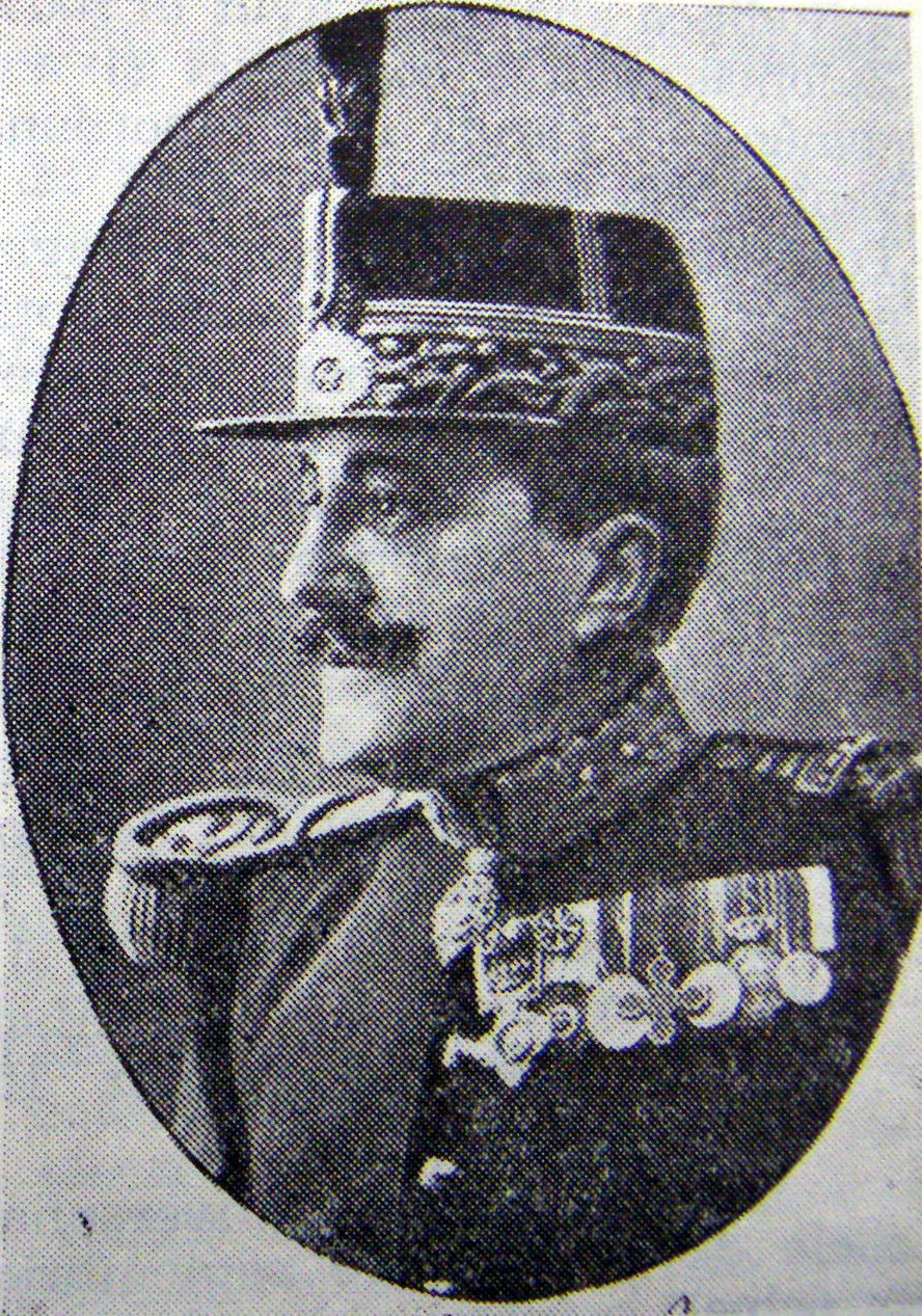 Generalul Mihail Aslan - comandantul Armatei 3 - 1916 - Sursa - fotocopie proprie din lucrarea : România în anii primului Război Mondial, Editura Militară, București, 1987 - Imaginea este în domeniul public din 1992, conform art. 7 din Decretul nr.321 din 18 iunie 1956